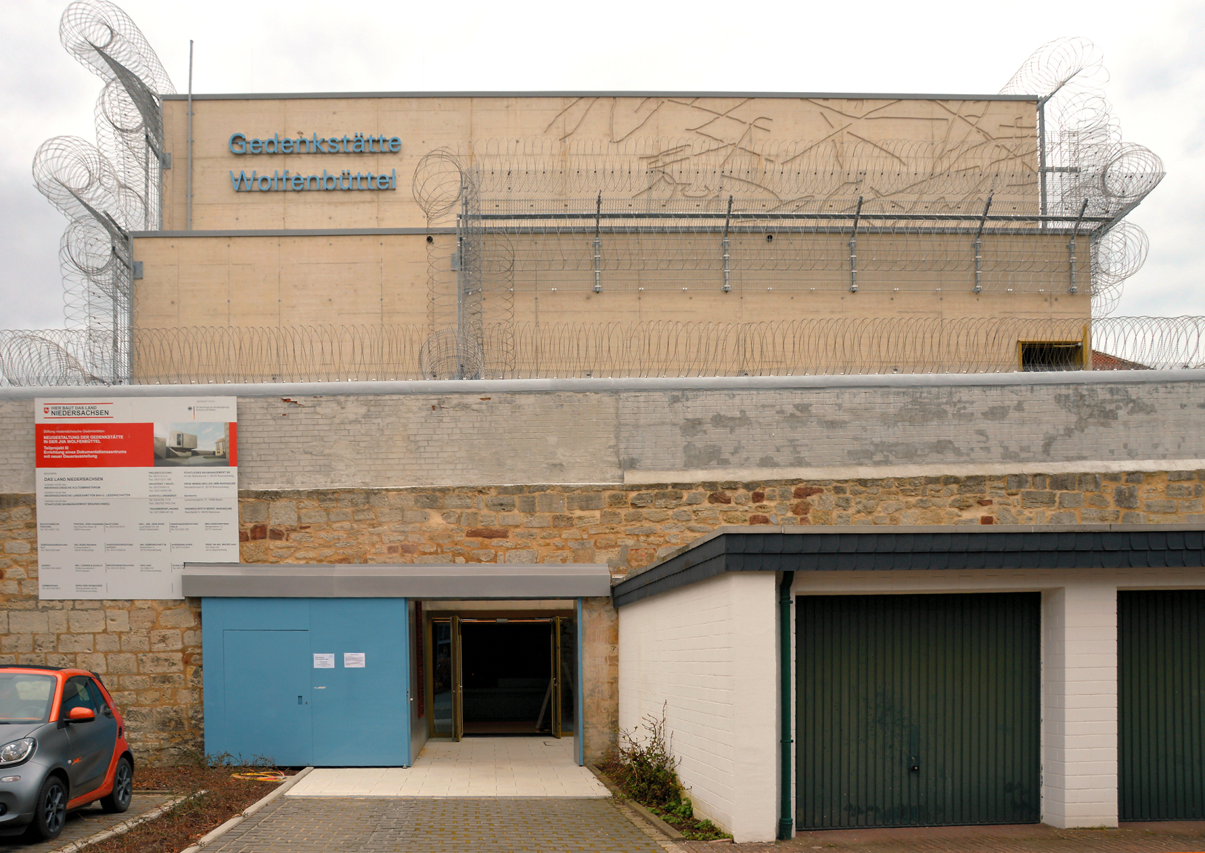 Eingang zum Dokumentationszentrum der Gedenkstätte in der JVA Wolfenbüttel, Am Herzogtore 13, Wolfenbüttel